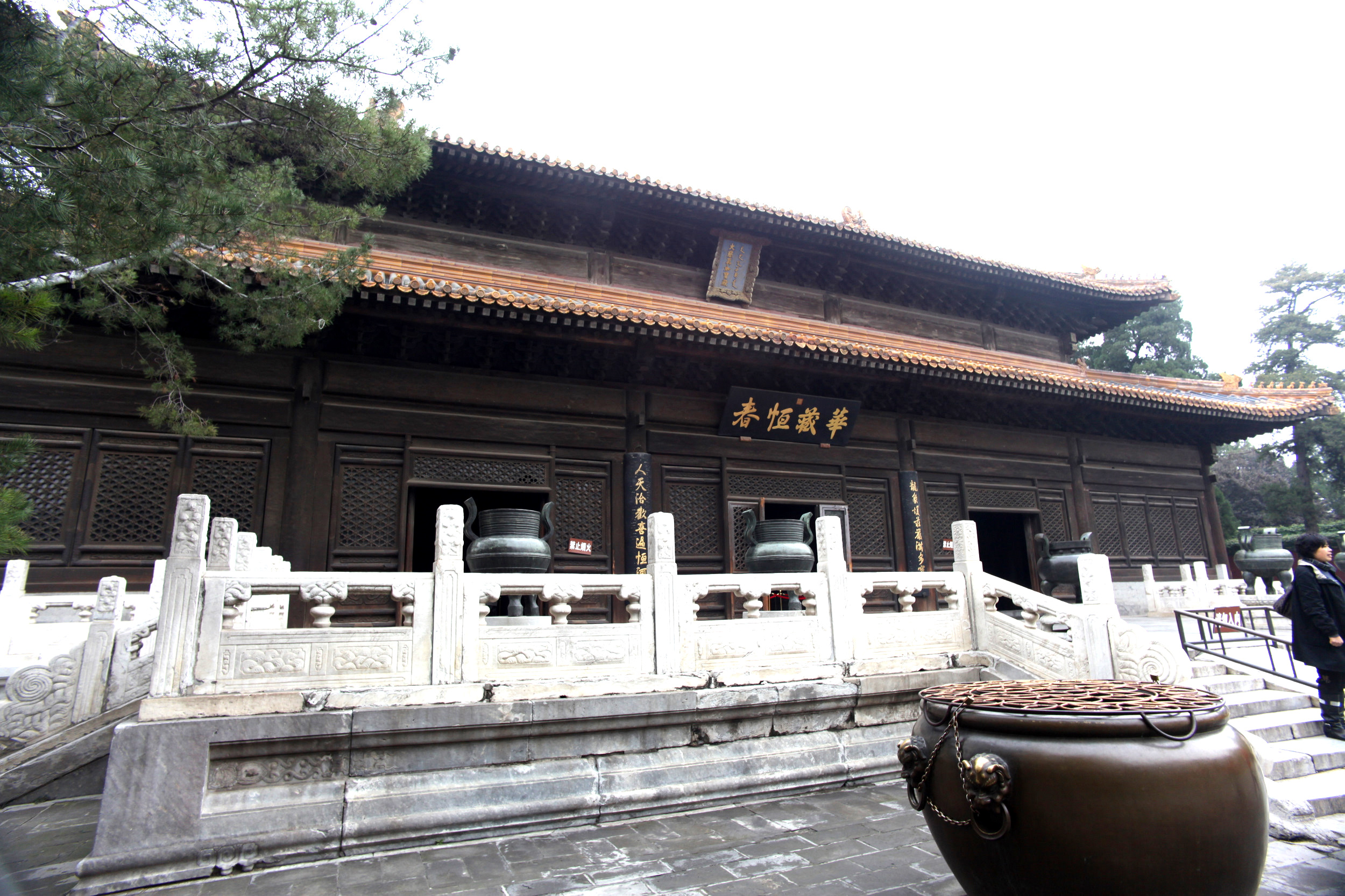 北海华藏恒春殿